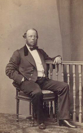 Рейтерн, Михаил Христофорович